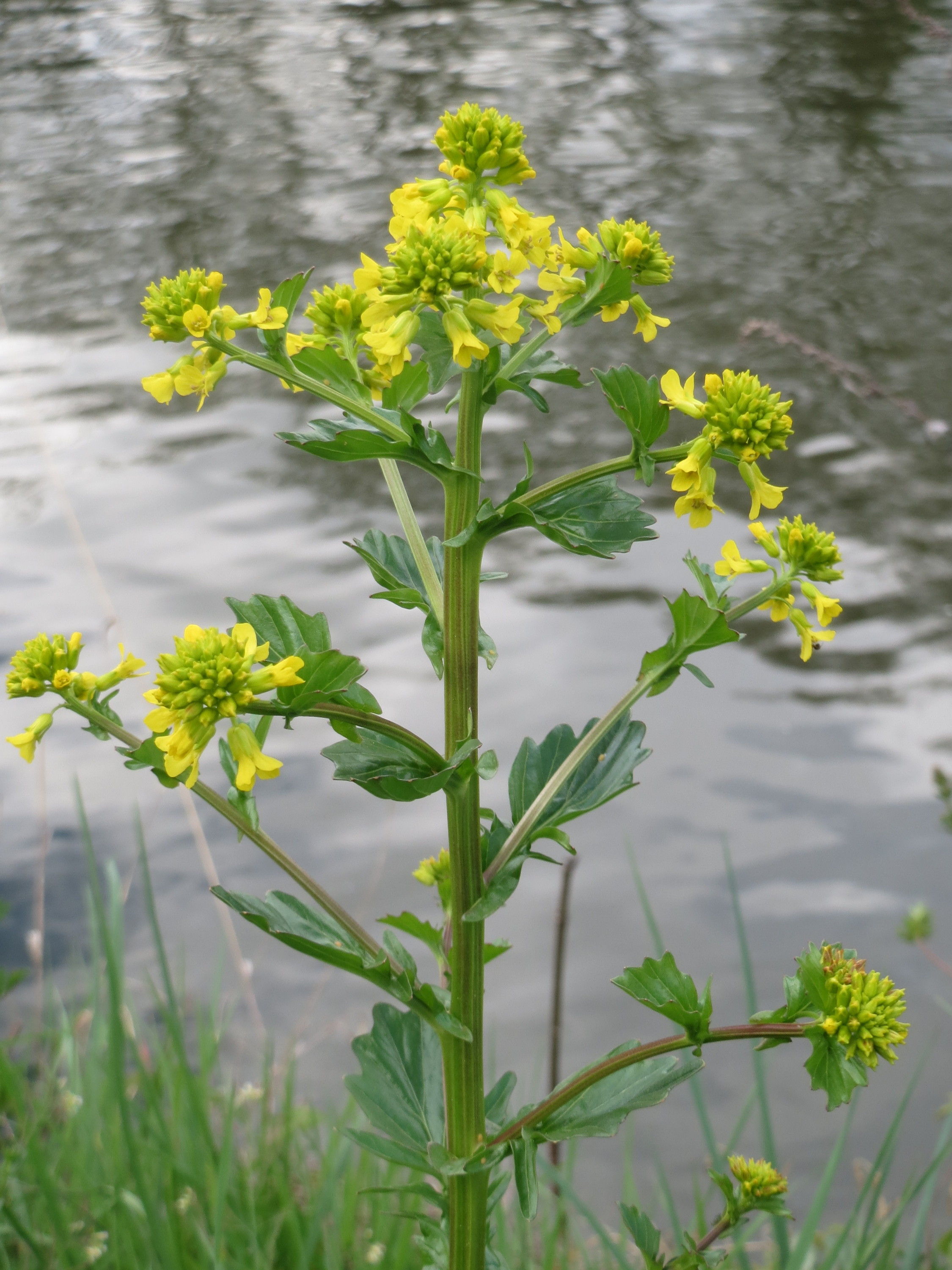 Winterkresse oder Barbarakraut (Barbarea vulgaris) an der Saar in Saarbrücken